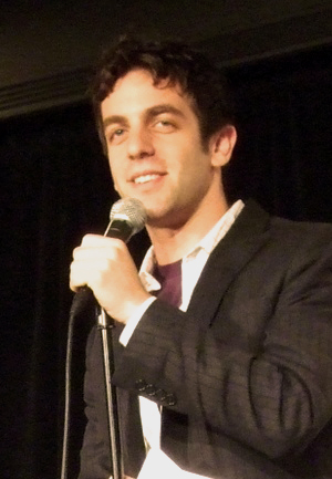 B.J. Novak